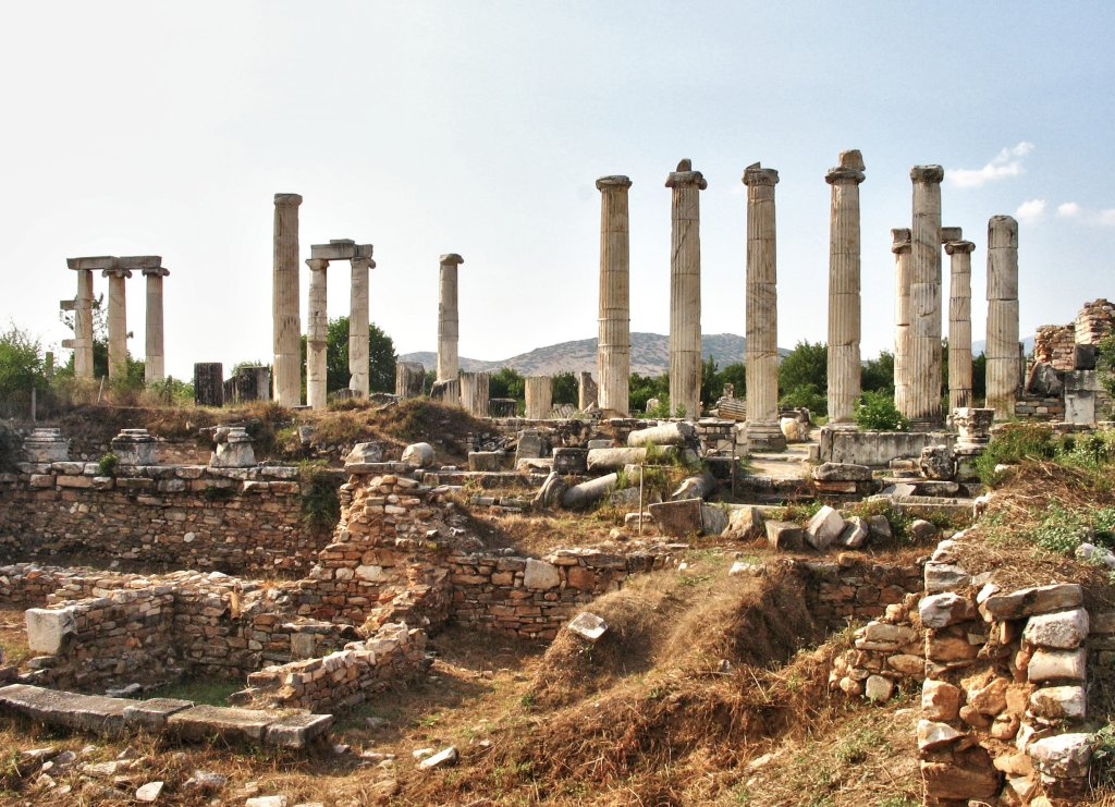 Aphrodite Tapınağı